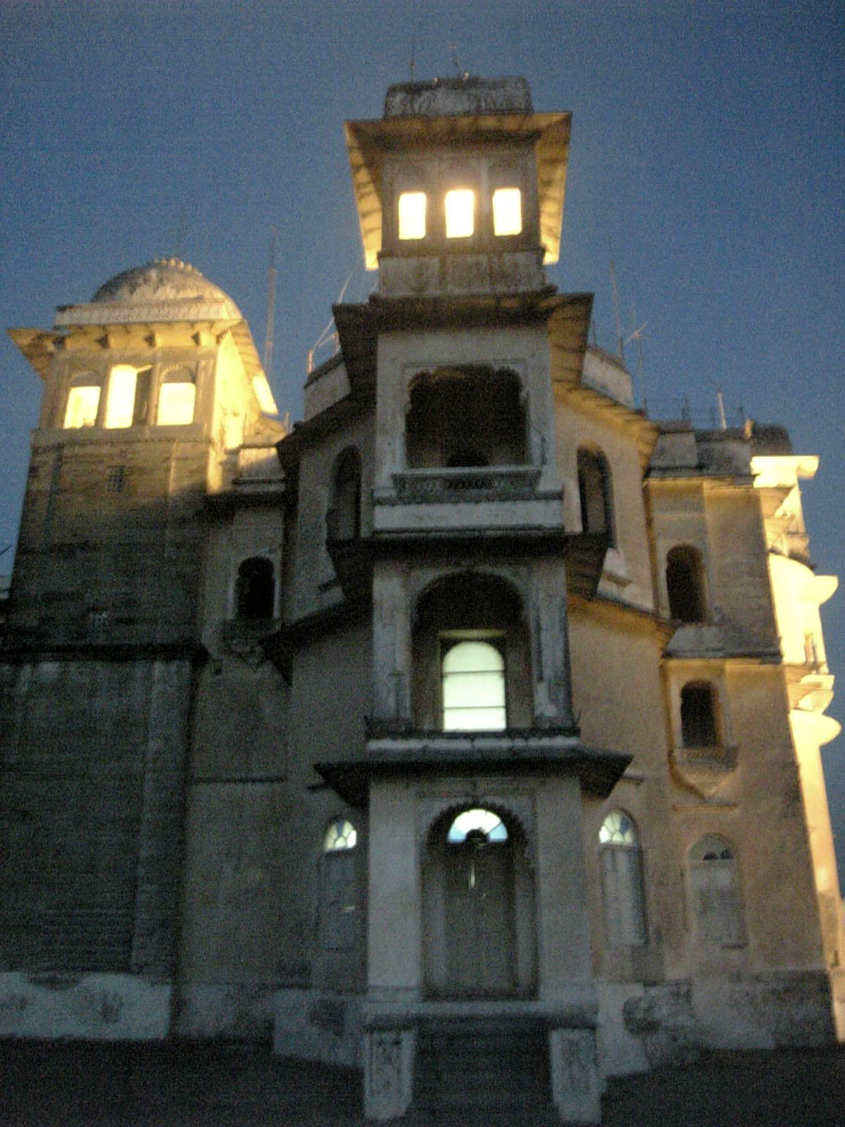 Sajan Garh in Udaipur